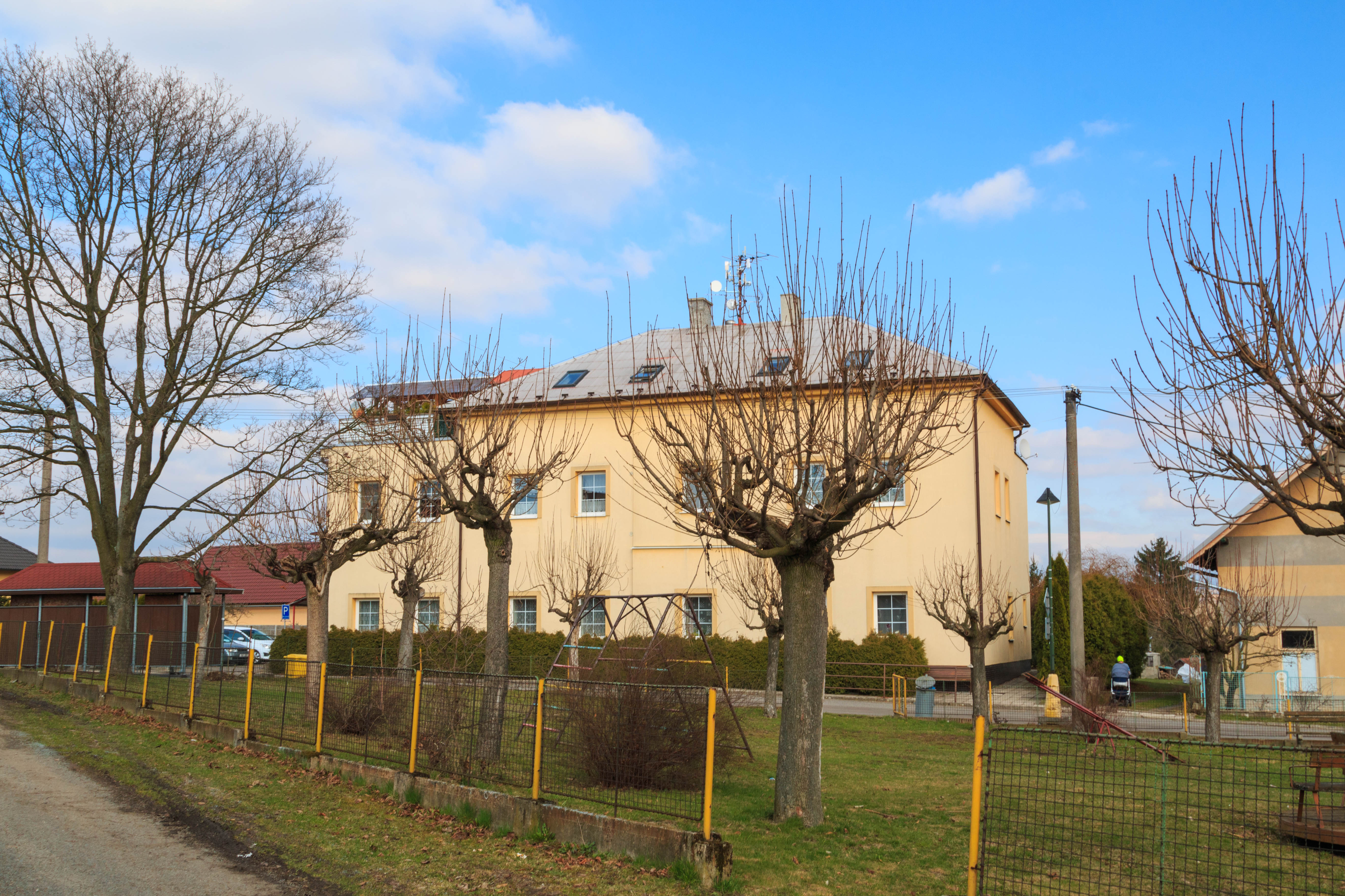 Hroška - škola